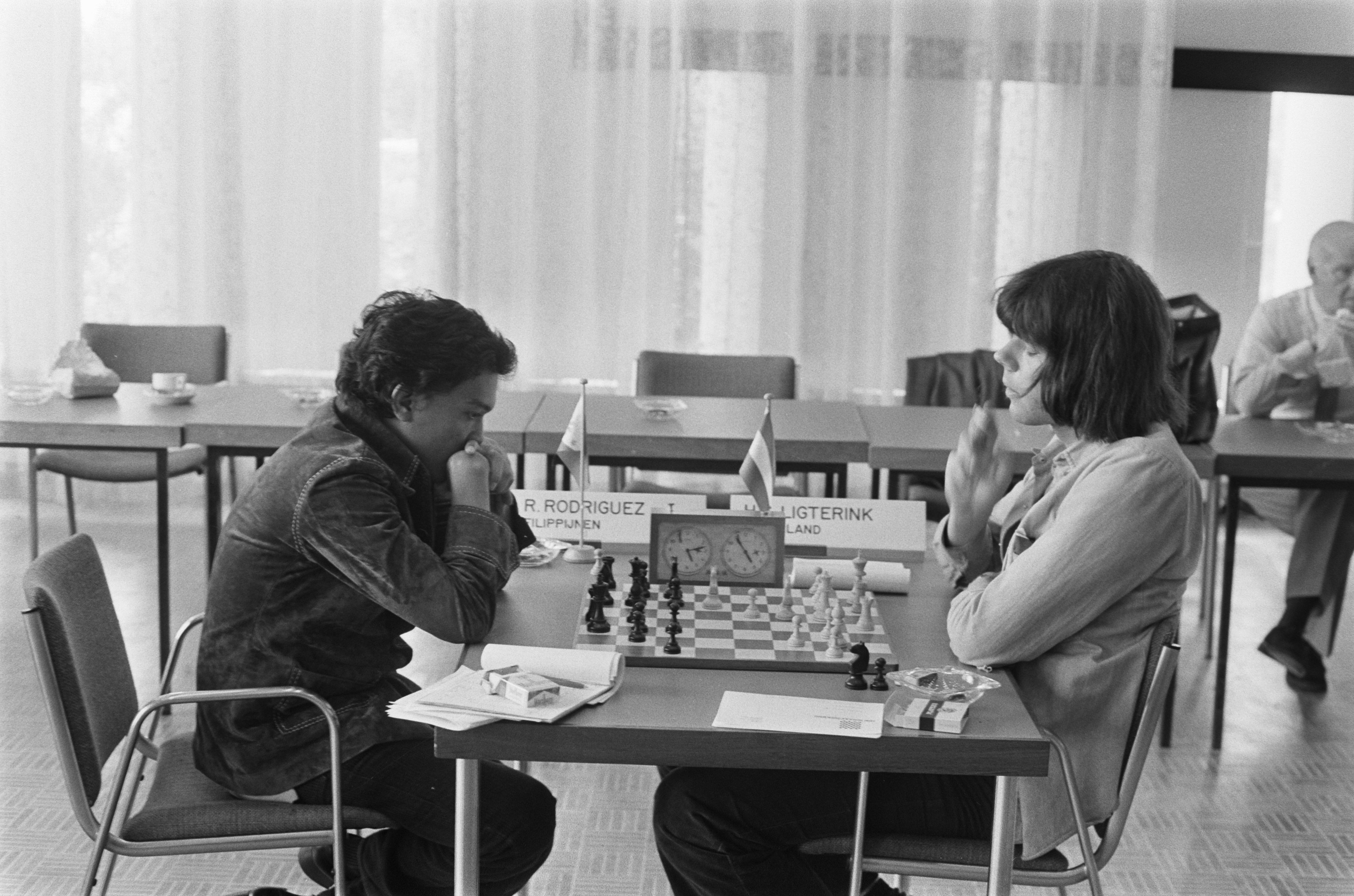 Collectie / Archief : Fotocollectie Anefo Reportage / Serie : IBM-schaaktoernooi 1975 te Amsterdam Beschrijving : Ligterink (r) tegen de Filippijn Rodriguez Annotatie : Randnummer negatiefstrook: nr 10A Timman Datum : 21 juli 1975 Trefwoorden : schaken, toernooien Persoonsnaam : Ligterink, Gert Instellingsnaam : IBM-Schaaktoernooi Fotograaf : Fotograaf Onbekend / Anefo Auteursrechthebbende : Nationaal Archief Materiaalsoort : Negatief (zwart/wit) Nummer archiefinventaris : bekijk toegang 2.24.01.05 Bestanddeelnummer : 928-0614